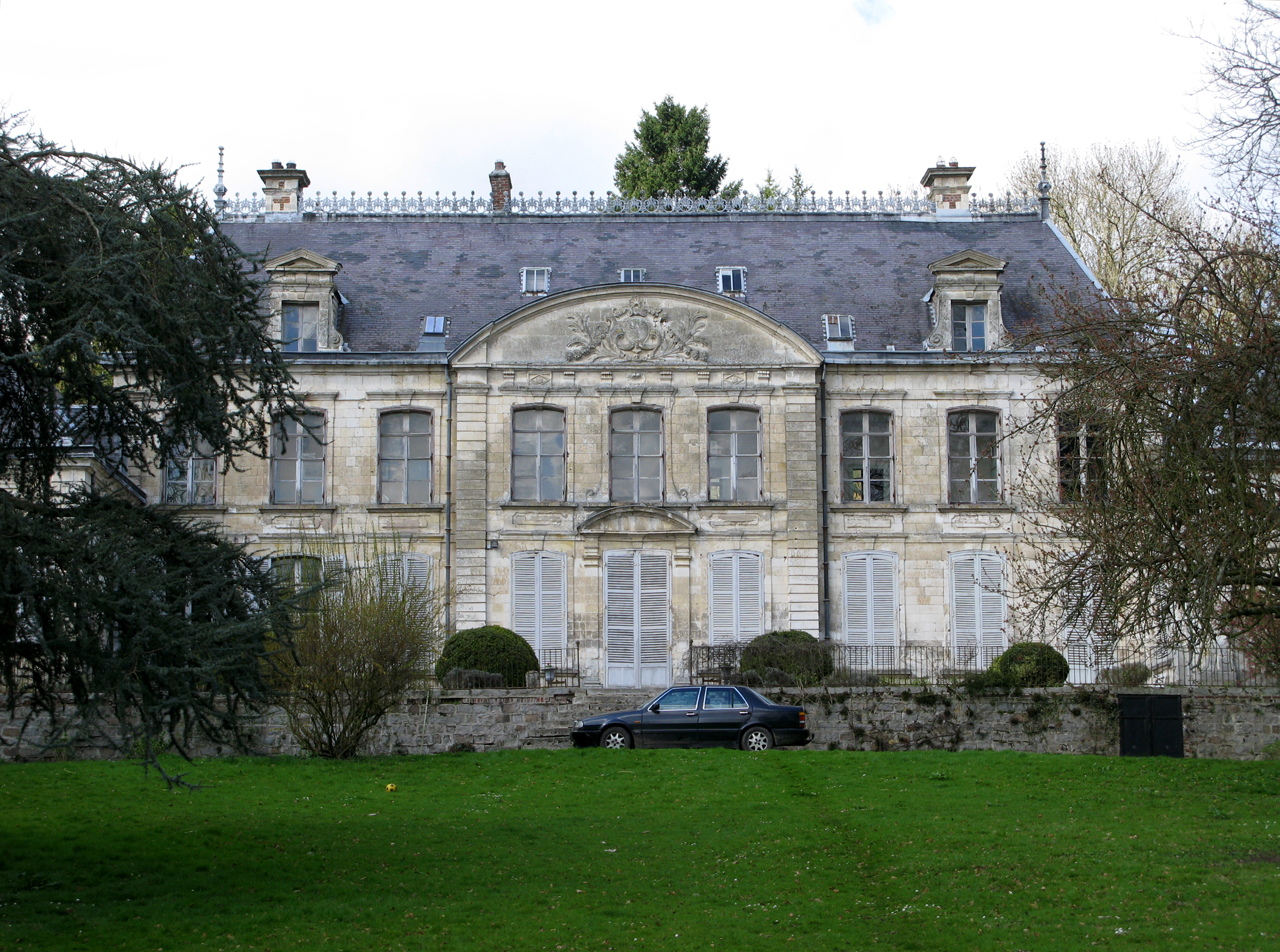 Contay (Somme, France) - Le château, vu de la rue, à travers la grille de la propriété installée entre les murs.